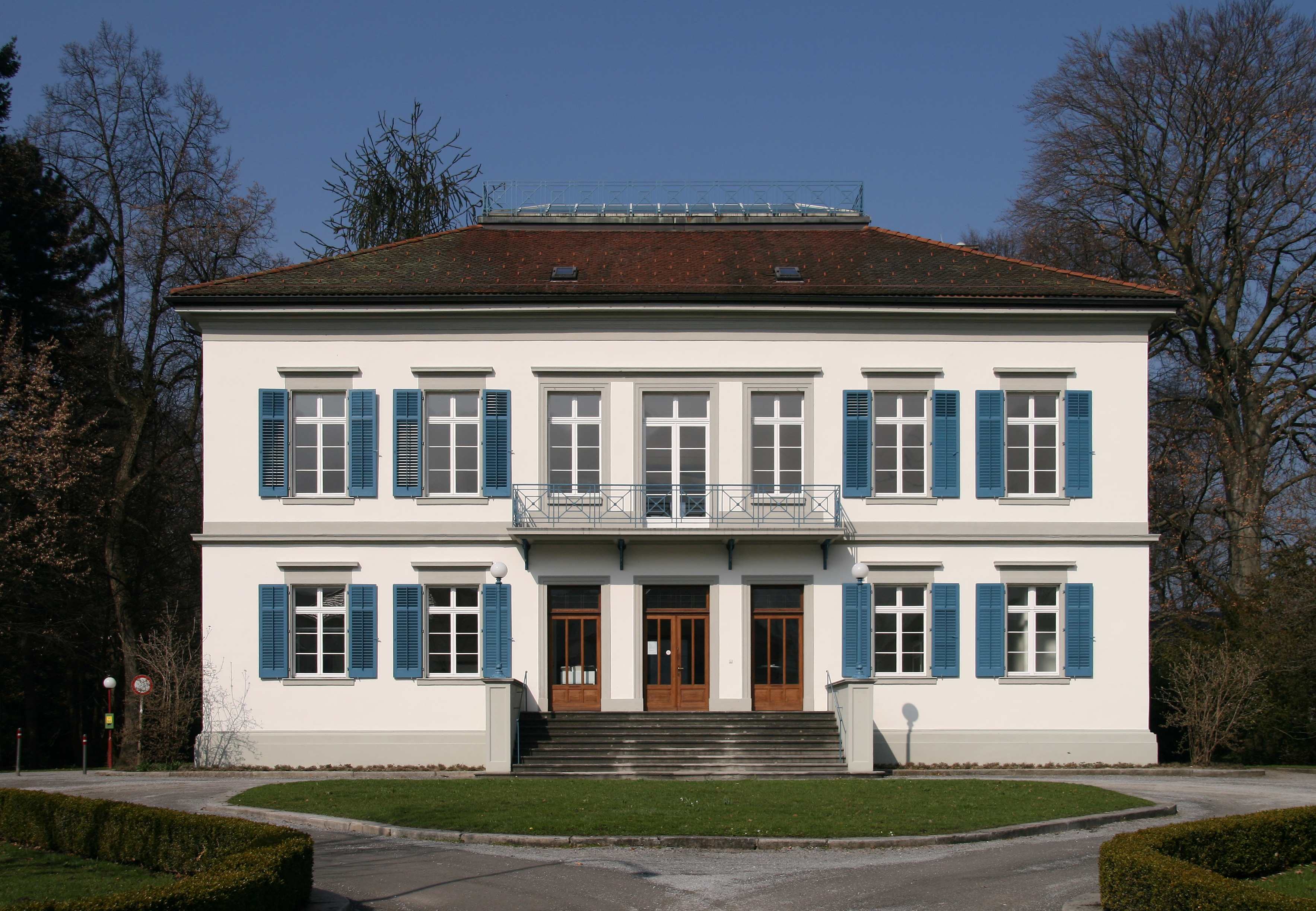 aus dem DEHIO Vorarlberg 1983: Gallusstraße Nr. 10: Palais Thurn und Taxis (ursprünglich Villa Gülich), erbaut 1848. Zurückgesetztes Hauptgebäude mit Hauptfront zur Straße, 2geschossig, Walmdach. Schließt mit seitlichen Nebengebäuden (Wirtschaft) kleinen Park in der Art eines Ehrenhofes ein. Fassade mit sieben Fensterachsen, erhöhtes Hauptgeschoß über Freitreppe zu erreichen (seitlich gußeisener Kandelaber), Gußeisenbalkon. Hinter dem Gebäude sogenannter Taxispark mit exotischen Bäumen. *** In der Oberstadt von Bregenz, Vorarlberg.